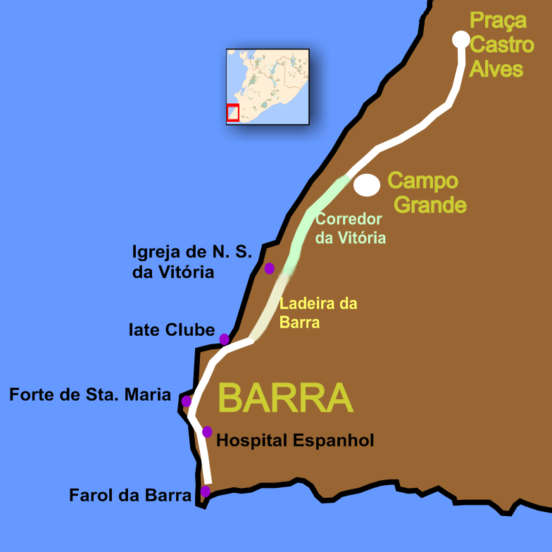 Mapa com a Avenida Sete de Setembro, em Salvador, Bahia